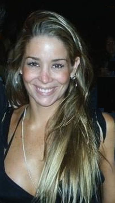 (Portuguese) A atriz brasileira Danielle Winits em evento de moda